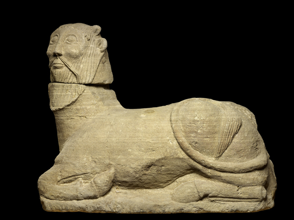 Bicha de Balazote (Cultura Ibérica). Número de inventario: 18529.